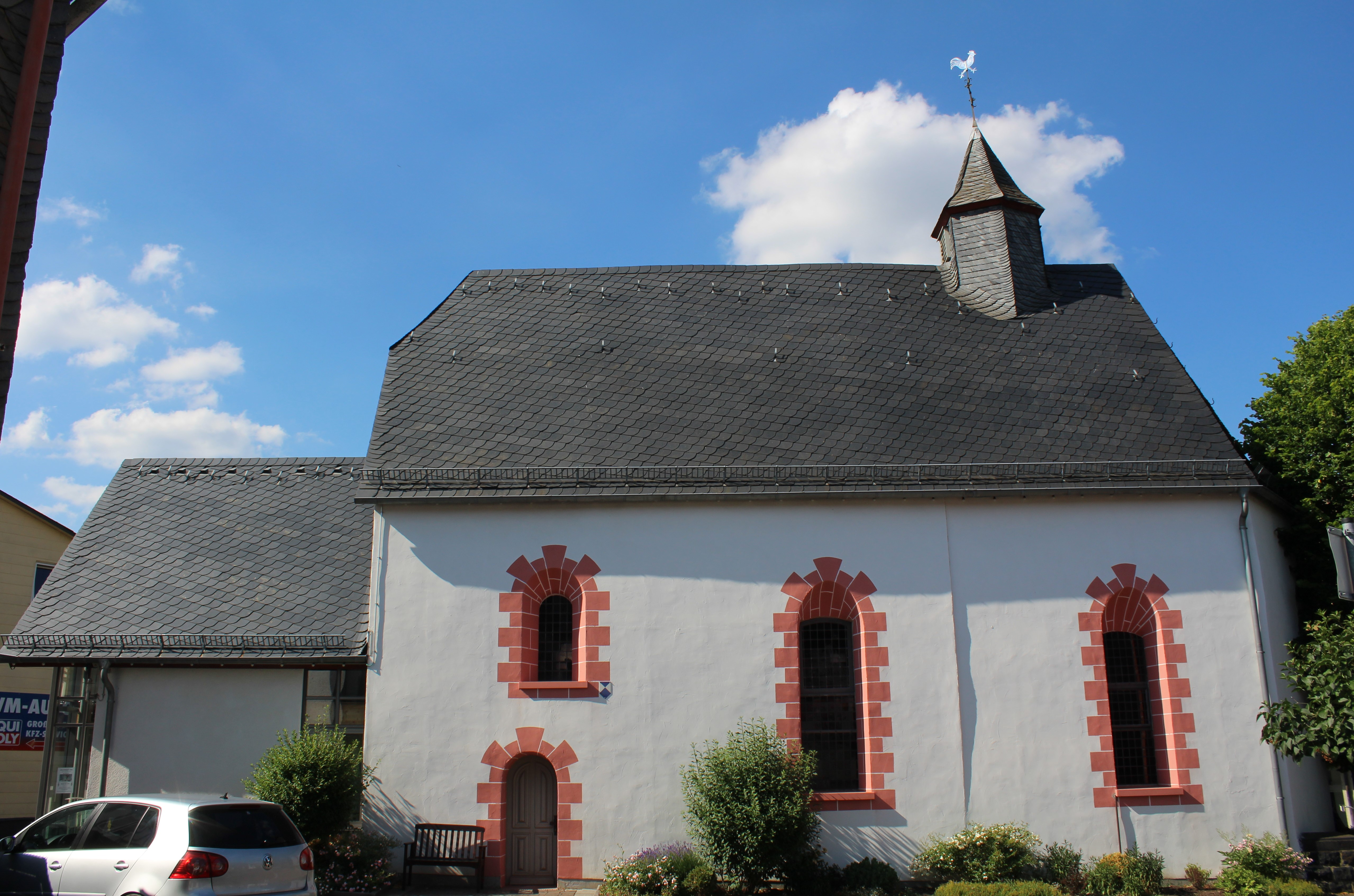 Evangelische Johanneskapelle Ewersbach, Gemeinde Dietzhölztal, Hessen, Deutschland